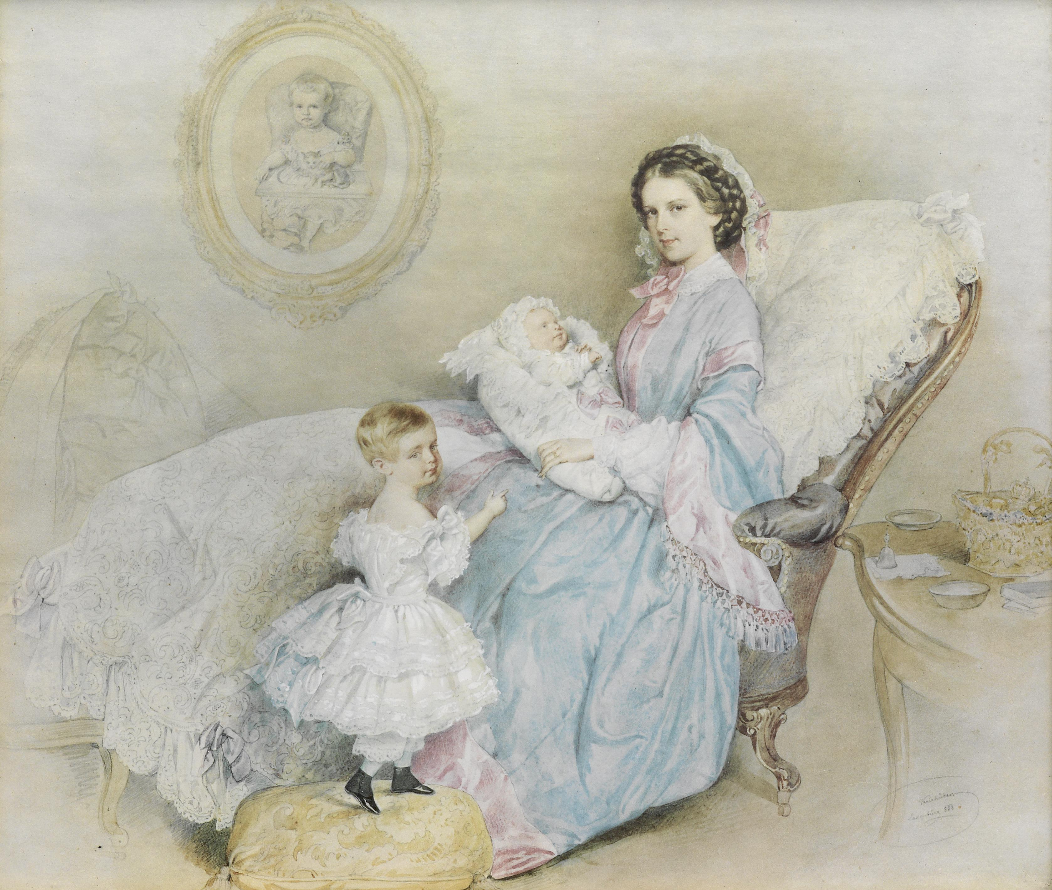 Kaiserin Elisabeth mit ihren Kindern, Lithographie von Kriehuber, Laxenburg 1858, teilweise koloriert, 34,5 x 29,5 cm